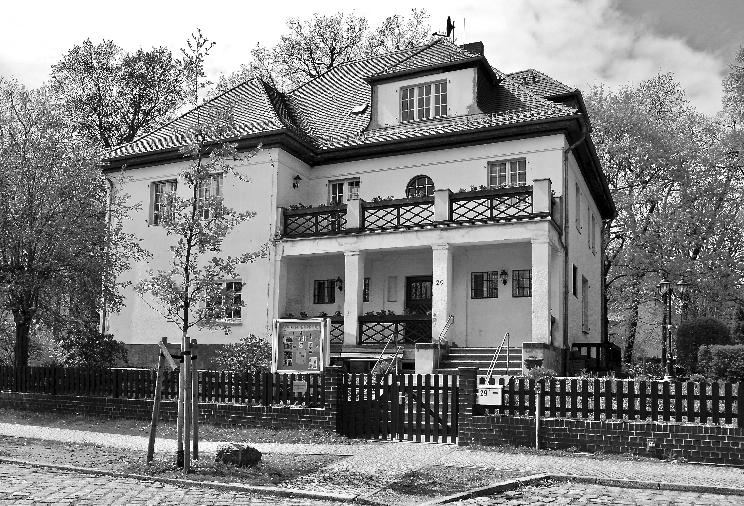 Baudenkmal: Landhaus des Publizisten und Politikers Heinrich (1854–1927) und seiner Ehefrau, der Journalistin, Schriftstellerin und Frauenrechtlerin Lily Braun (1865–1916), Erlenweg 29, Kleinmachnow, 1909 erbaut, damals zu Zehlendorf gehörend. Deren Sohn war der Lyriker Otto Braun (1896–1918). Das seinerzeit große Anwesen wurde später in mehrere Parzellen aufgeteilt, daher befindet sich das erhaltene Grab und das Grabmal von Lily Braun und deren Sohn Otto auf einem heutigen Nachbargrundstück.